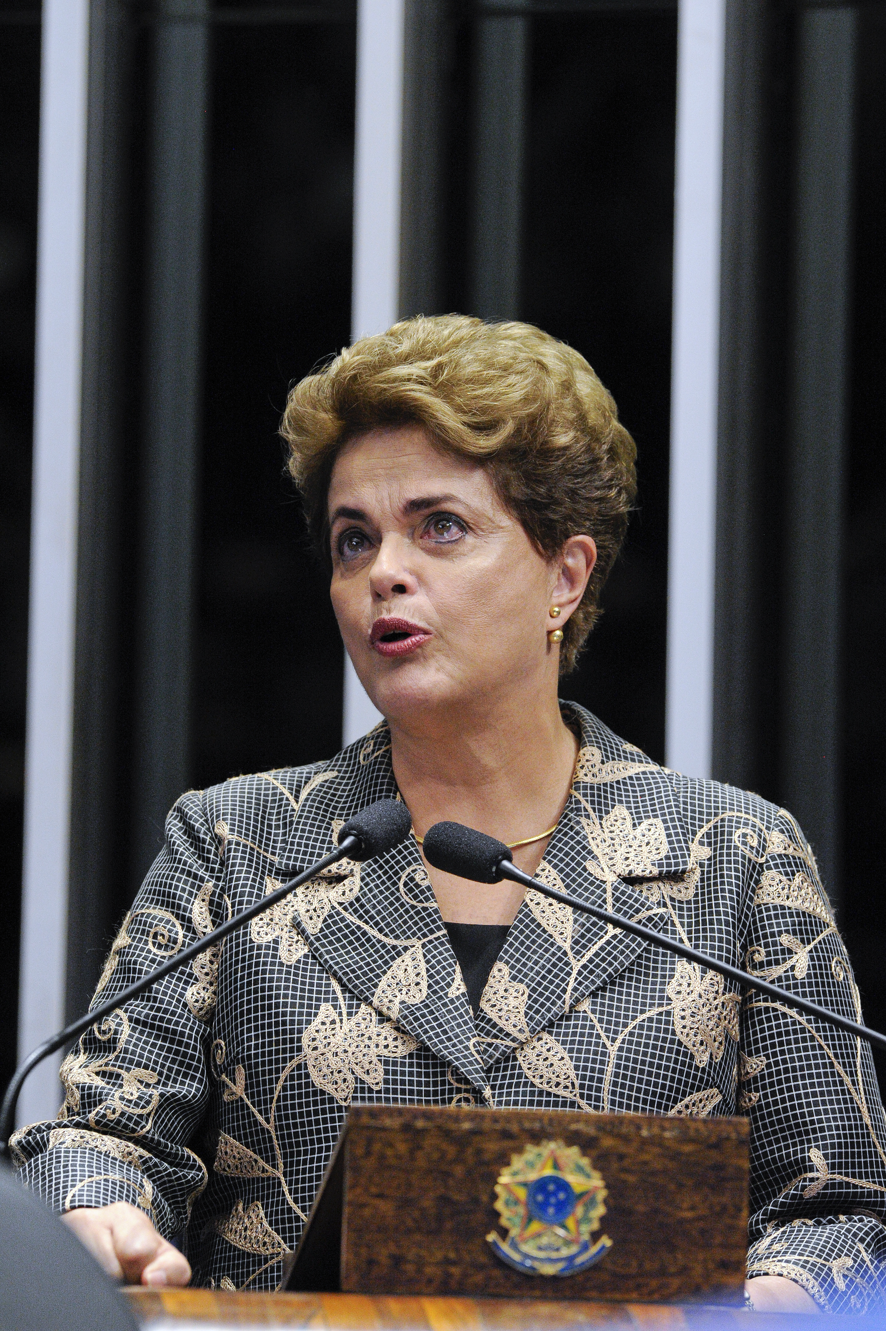 Plenário do Senado Federal durante sessão deliberativa extraordinária para votar a Denúncia 1/2016, que trata do julgamento do processo de impeachment da presidente afastada Dilma Rousseff por suposto crime de responsabilidade. Em discurso, presidente afastada Dilma Rousseff. Foto: Edilson Rodrigues/Agência Senado